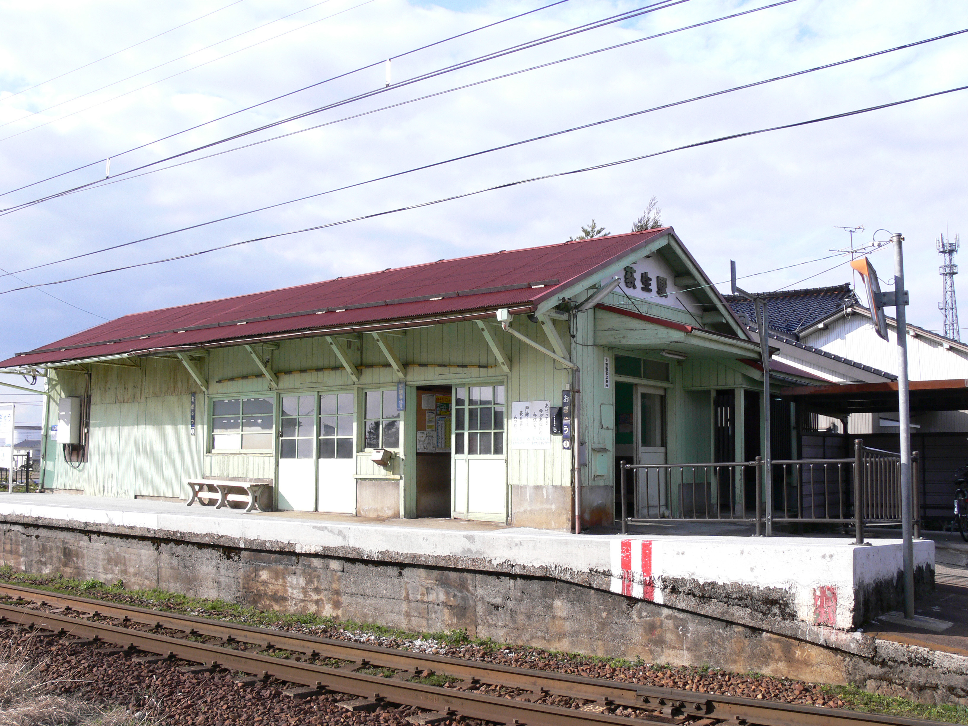 荻生駅駅舍